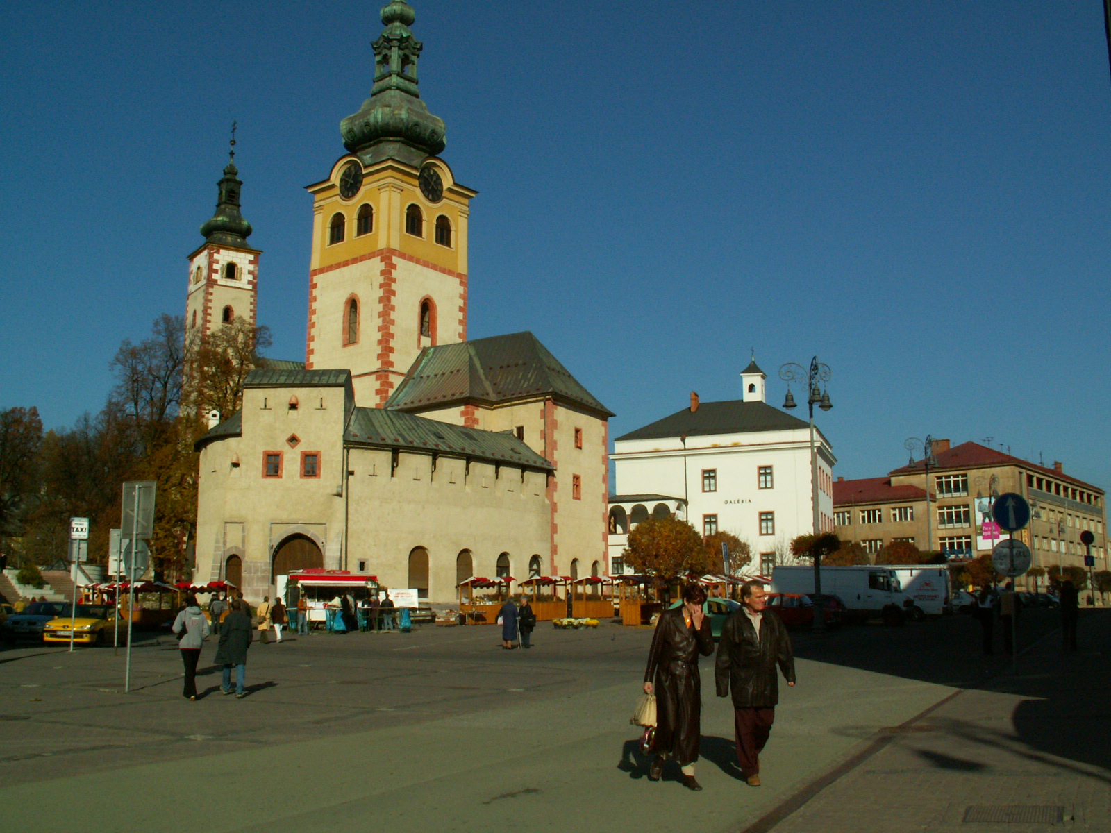 Námestie SNP - Barbakan a stará radnica